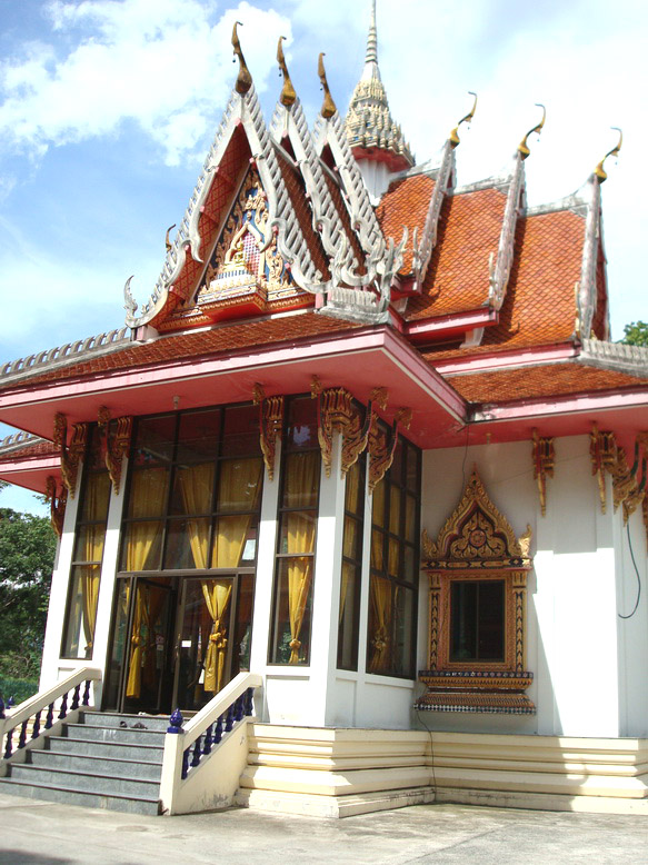 พระอุโบสถประดิษฐานพระแก้วมรกตจำลอง วัดคีรีวัน จ.นครนายก